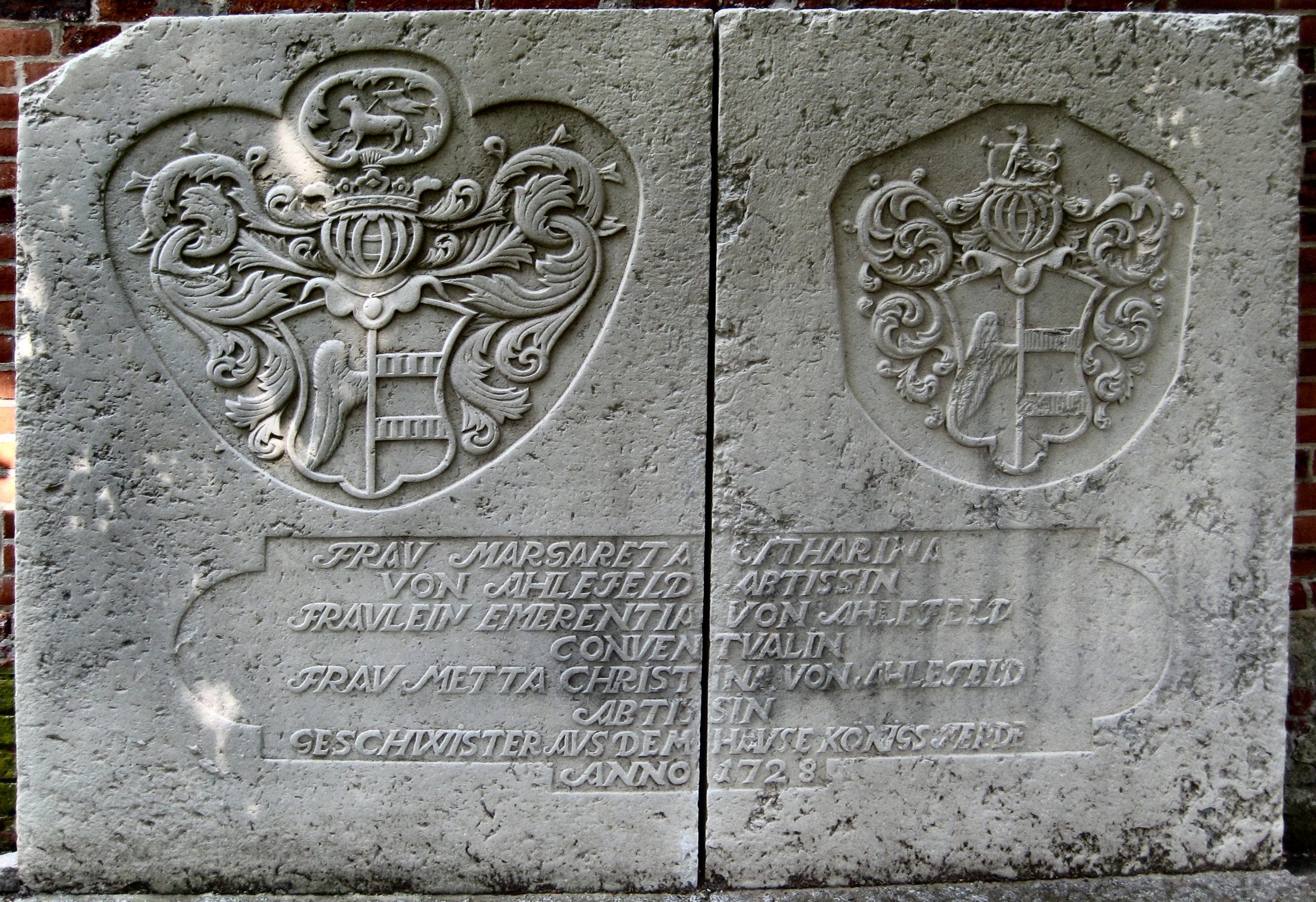 Itzehoe, einer der Grabstein an der Stadtkirche St. Laurentii